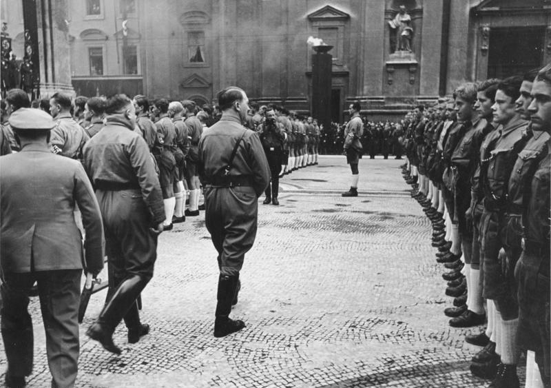 Der Führer schreitet die Front der jüngsten Parteigenossen ab Information added by Wikimedia users.Anläßlich des Hitlerputsches am 9. November 1923 in München wird jährlich an der Feldherrnhalle durch den "Marsch auf die Feldherrnhalle" der Gefallenen gedacht. November 09, 1934 Kranzniederlegung und 'Treuegelöbnis' der Hitler-Jugend vor der Feldherrnhalle, München [1] Offiziell "Gedenktag für die Gefallenen der Bewegung" seit 9. November 1939.